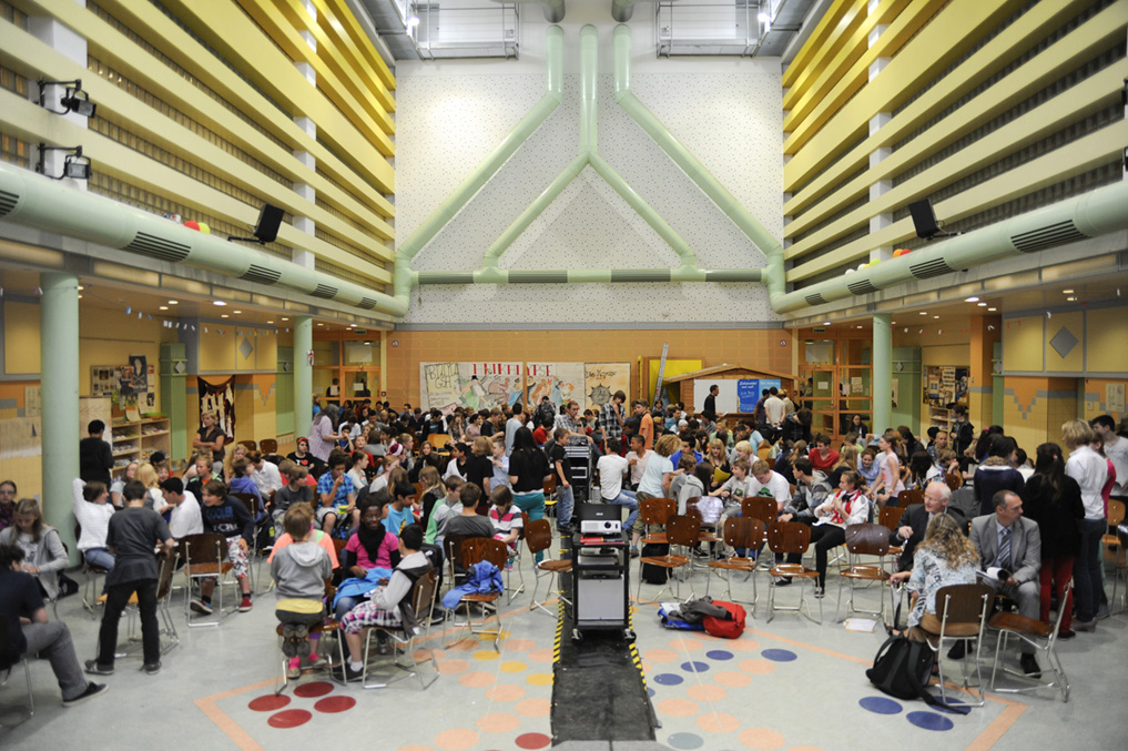 Schüler fragen - der Klimaschutzminister antwortet Die Essener Gesamtschule Holsterhausen wurde im Juli 2012 von Johannes Remmel, Minister für Klimaschutz, Umwelt, Landwirtschaft, Natur- und Verbraucherschutz des Landes Nordrhein-Westfalen und dem Geschäftsführer der EnergieAgentur.NRW, Frank-Michael Baumann, zur EnergieSchule.NRW ausgezeichnet. Flickr tags: Aktion; Essen; Gesamtschule Holsterhausen; EnergieAgentur.NRW; Klimaschutz; Schüler fragen; Schüler; KlimaSchule; 2012; Johannes Remmel; Frank-Michael Baumann